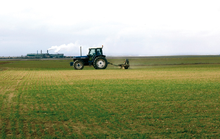 Tractor passant el corró o roleu a La Gineta (comarca Centro - Albacete), 15 de febrer de 2008.